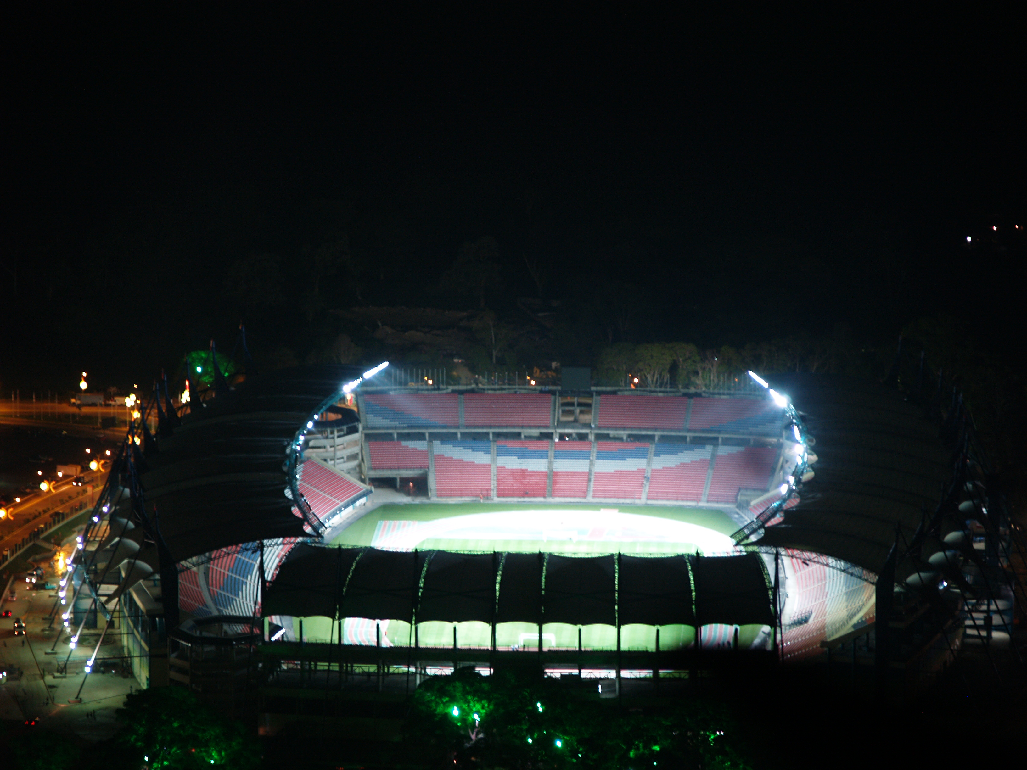 Como ya se me hizo costumbre, retrto con mi cámara al gran Coloso que albergará al siguiente día el primer partido de la Copa América Venezuela 2007 entre las selecciones de Uruguay y Perú. Capturada desde el mirador de la Venezuela de Antier a unos 5 minutos de la ciudad de Mérida, vale acotar que es la foto que más me ha costadop tomar pues el lugar es sitio frecuente de secuestros y asaltos y la iluminación era casi nula :D.